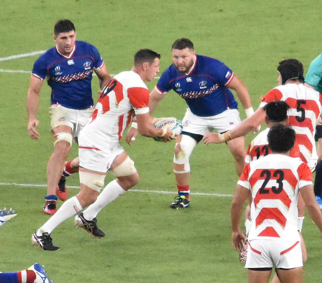 トンプソンルーク